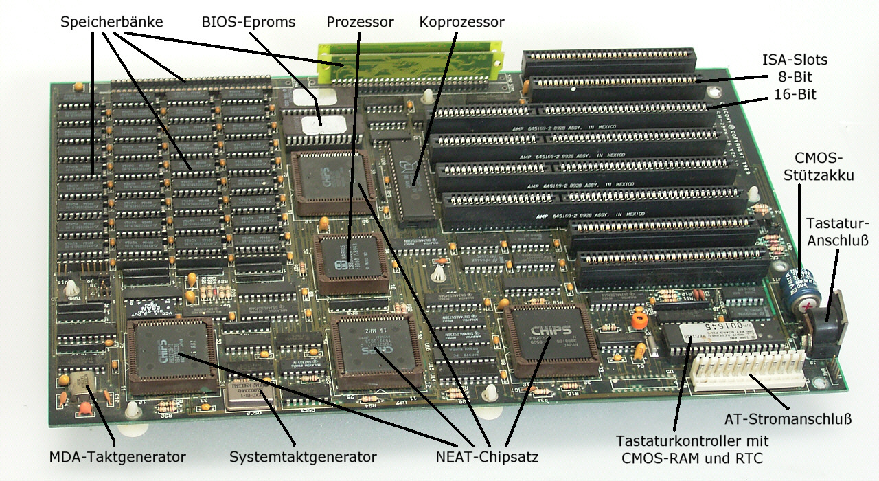 Mainboard im Baby-AT-Format Chicony CH-286N-16 für Intel 80286 und kompatible Prozessoren (1989) (mit Baugruppenbezeichnung in deutsch)